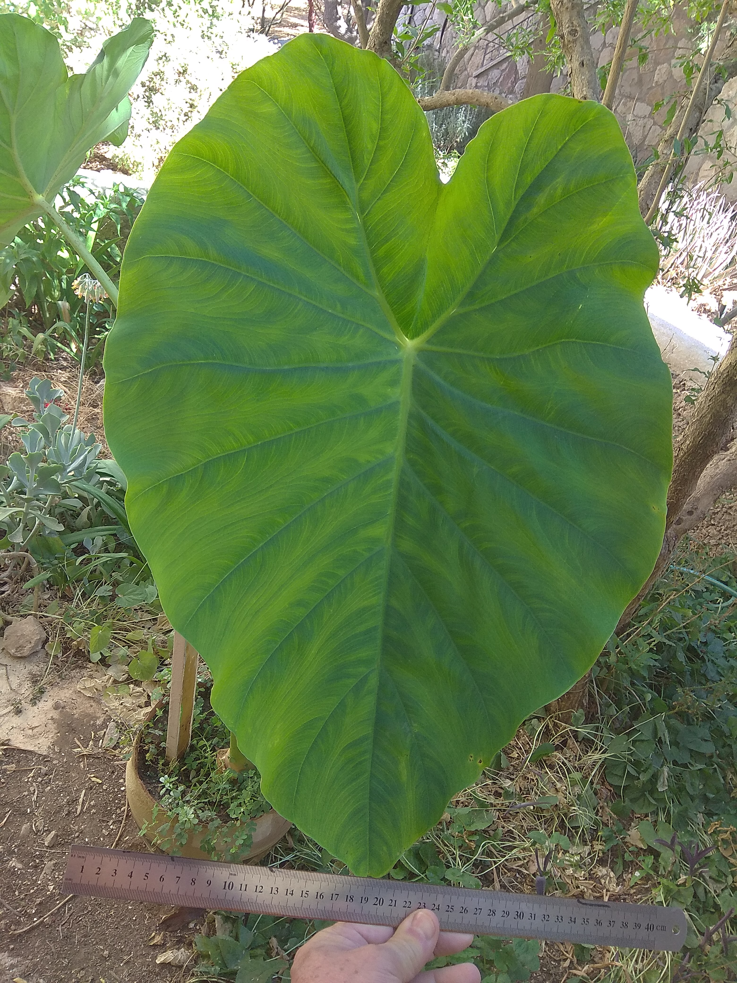 colocasia israel